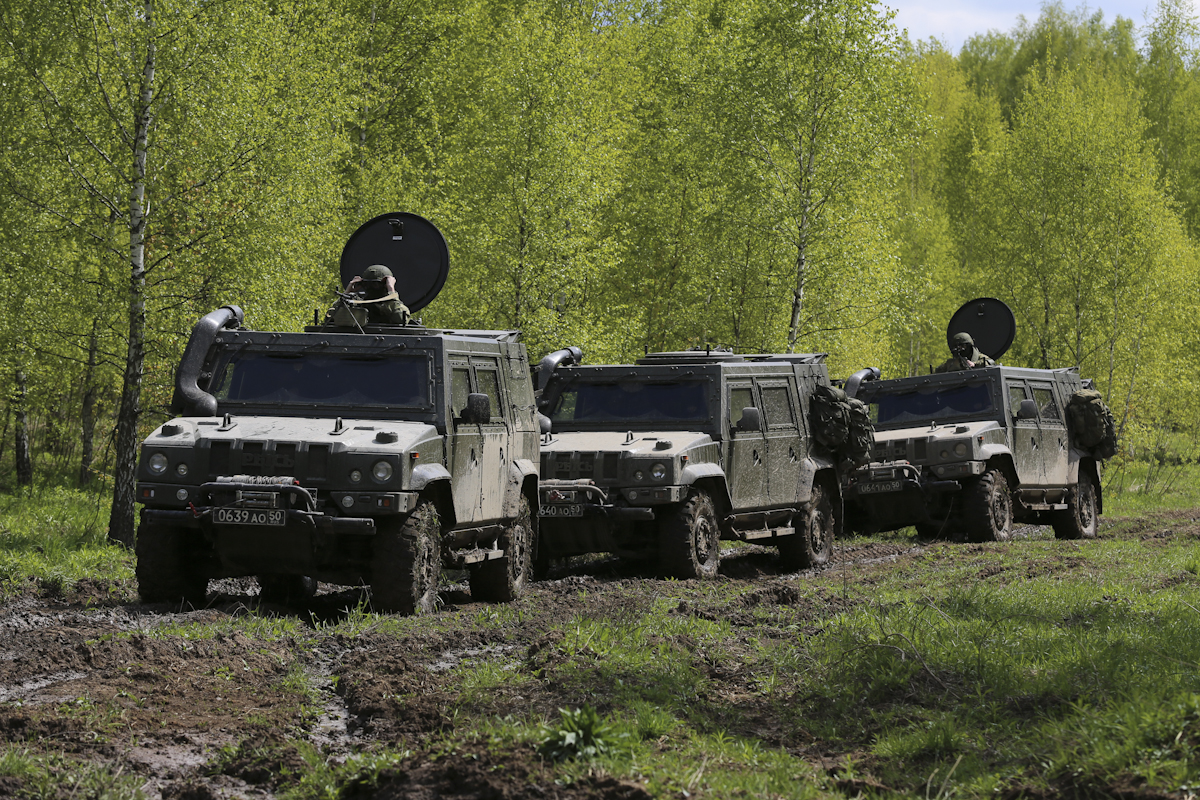 Выполнение задач разведывательной ротой ВДВ на специальных машинах «Рысь» в ходе учения в Тульской области.